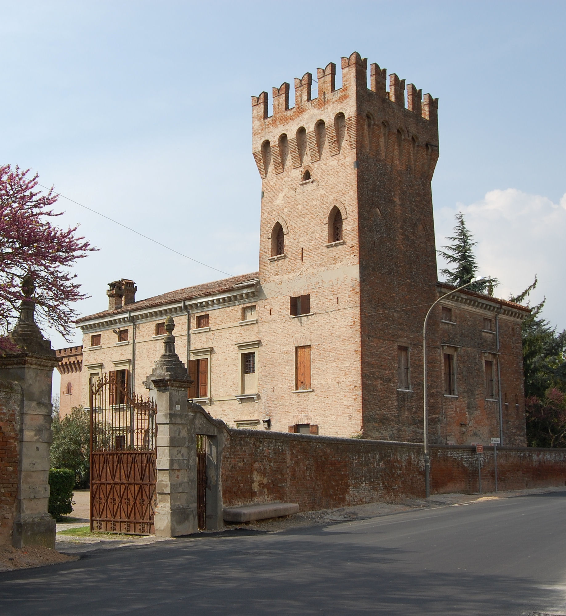 Corte Domenicale Campagna (detta "Il Castello") a Bionde (VR)